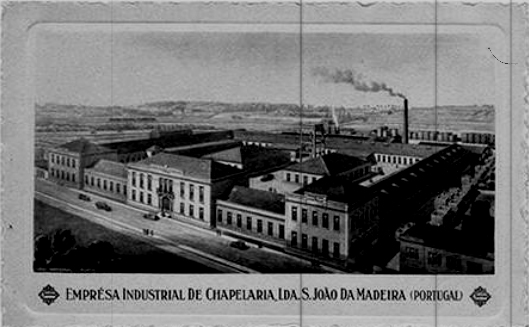 Empresa Industrial de Chapelaria, uma das maiores fábricas de Portugal em 1914, fundada por Oliveira Júnior. O edifício é testemunho da história da indústria de chapéus na cidade, desde o seu apogeu ao declínio, e hoje o edifício é sede do Museu da Chapelaria.